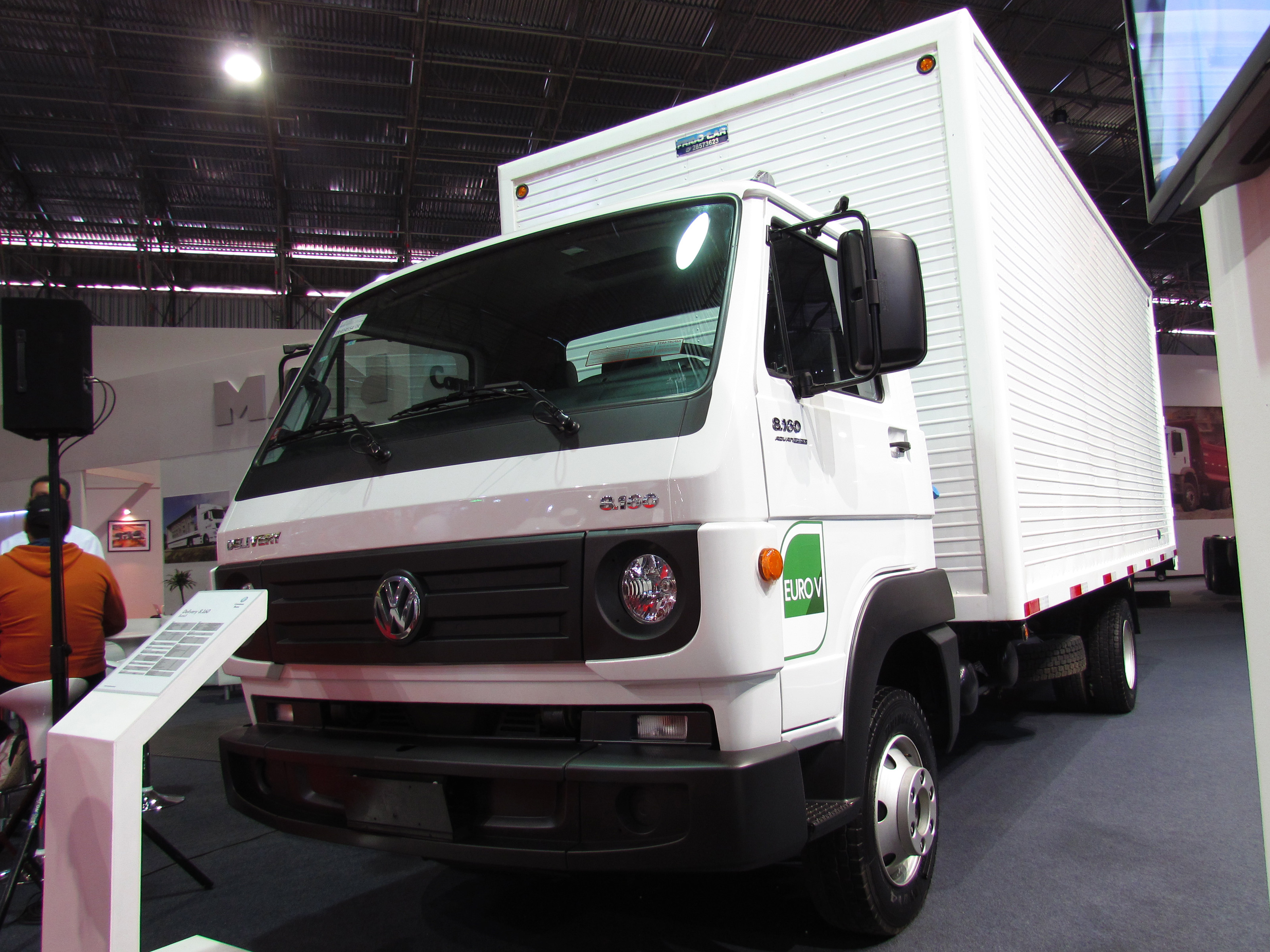 Volkswagen 8.160 Delivery 2014